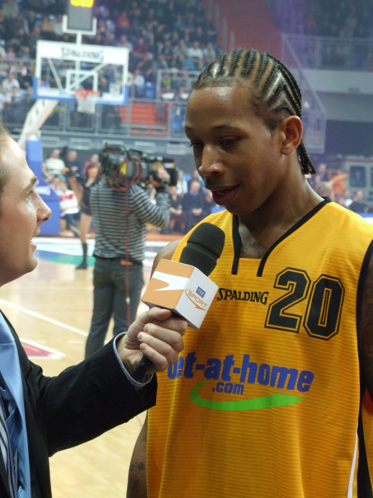 Eddie Miller podczas meczu gwiazd w 2010 roku